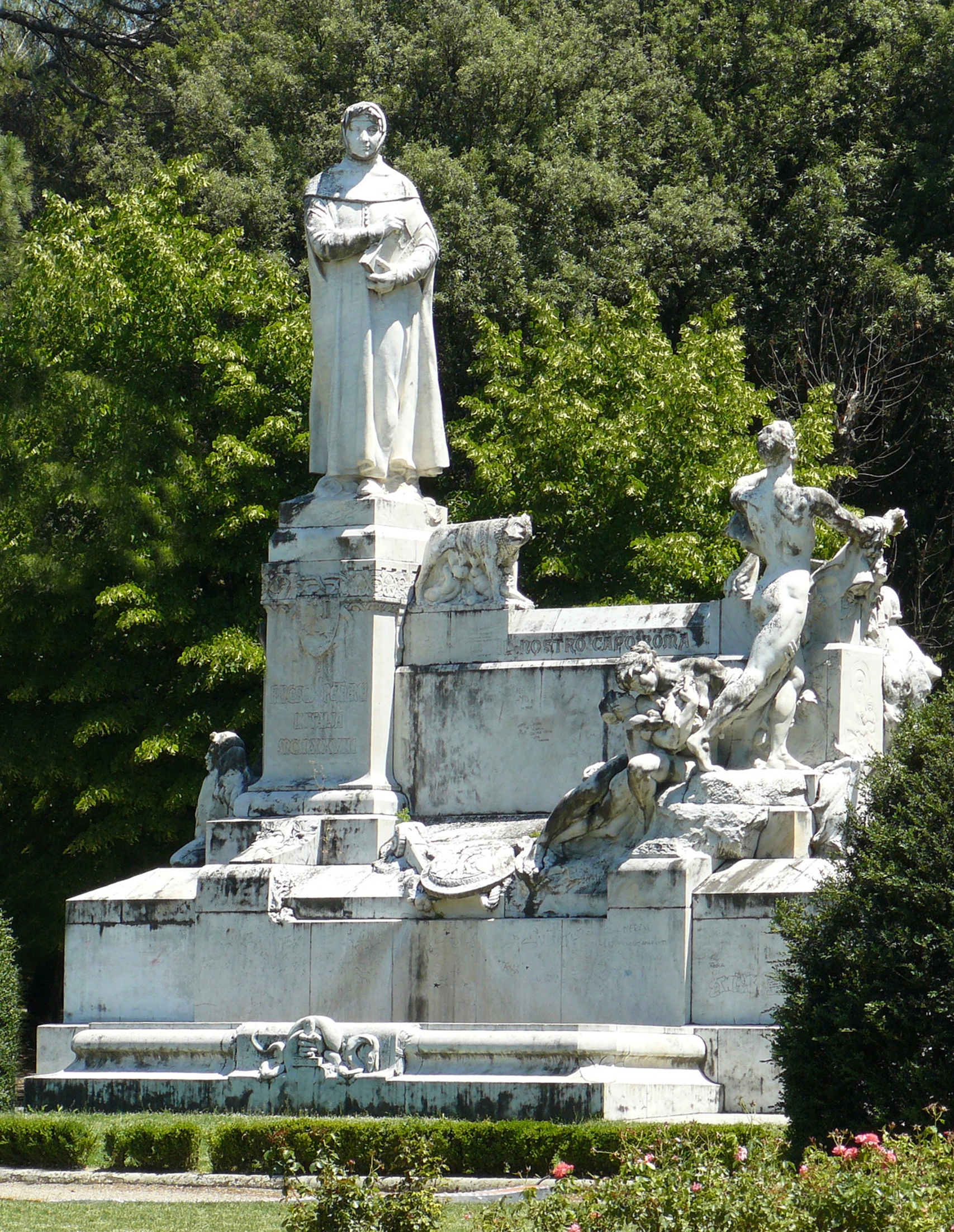 Statue of Petrarca in Arezzo